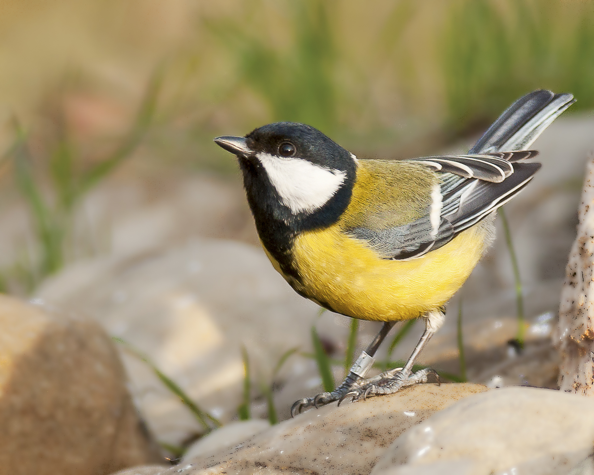 Cinciallegra